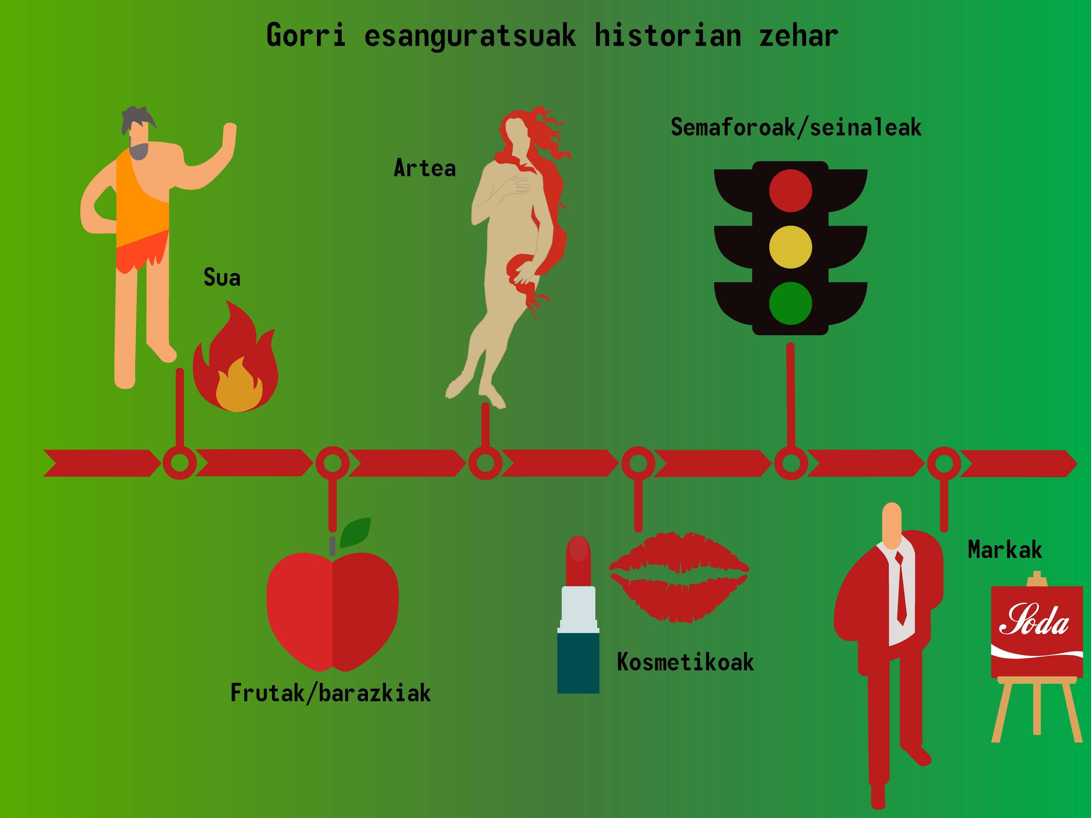 gorri esanguratsuak historian zehar